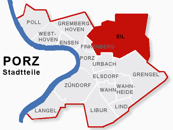 Lage des Stadtteils Eil im Stadtbezik Porz